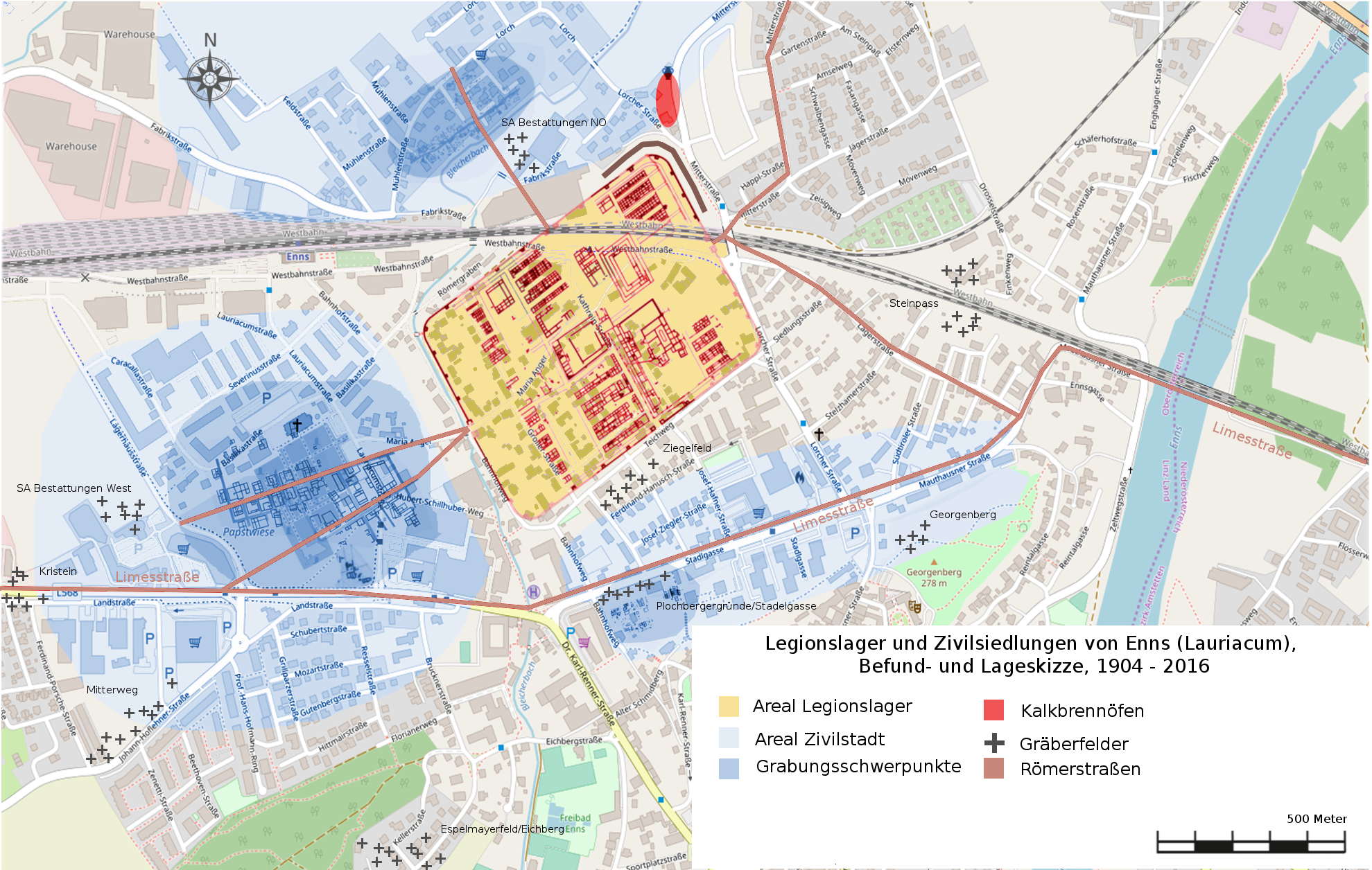 Lageskizze Legionslager, Zivilstadt und Römerstraßen von Lauriacum (Enns) im 3. Jahrhundert n.Chr., Befunde 1905 bis 2016.